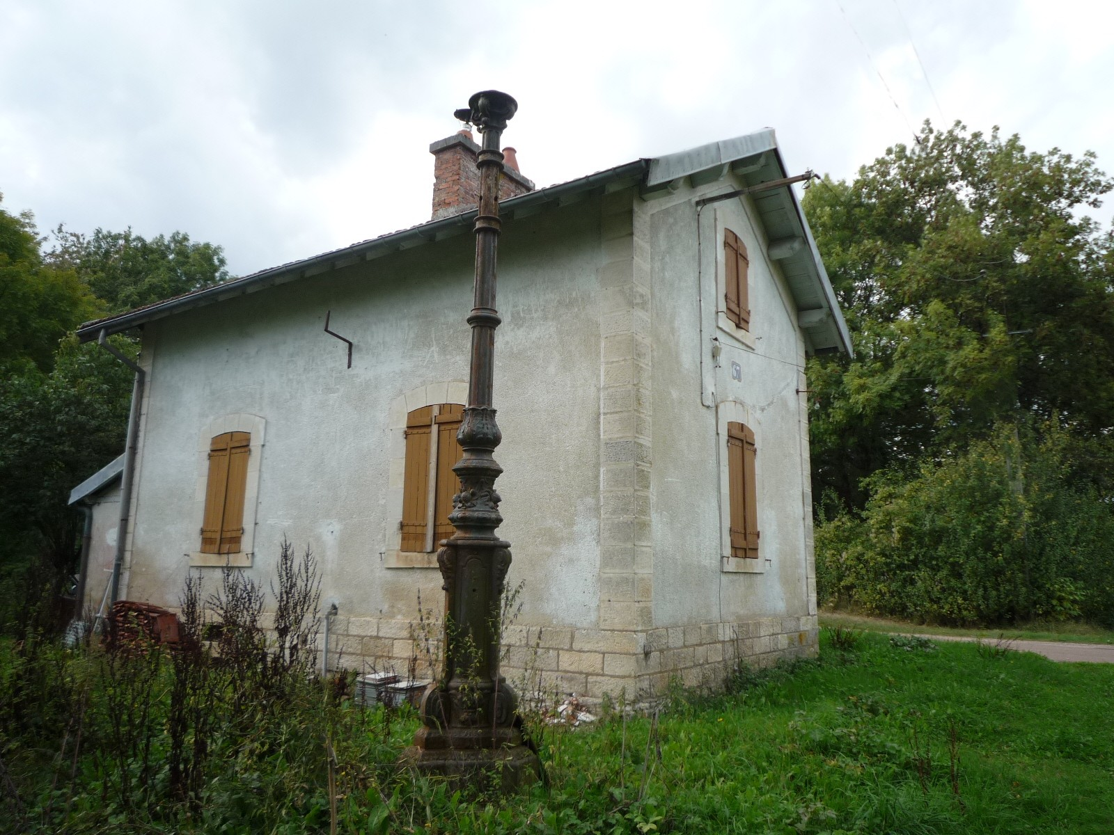 Ancienne ligne de Triguères à Surgy : maison de garde-barrière à Fougilet (hameau de Sougères-en-Puisaye). À noter, le poteau d'éclairage qui semble d'époque a été ajouté par un propriétaire contemporain.